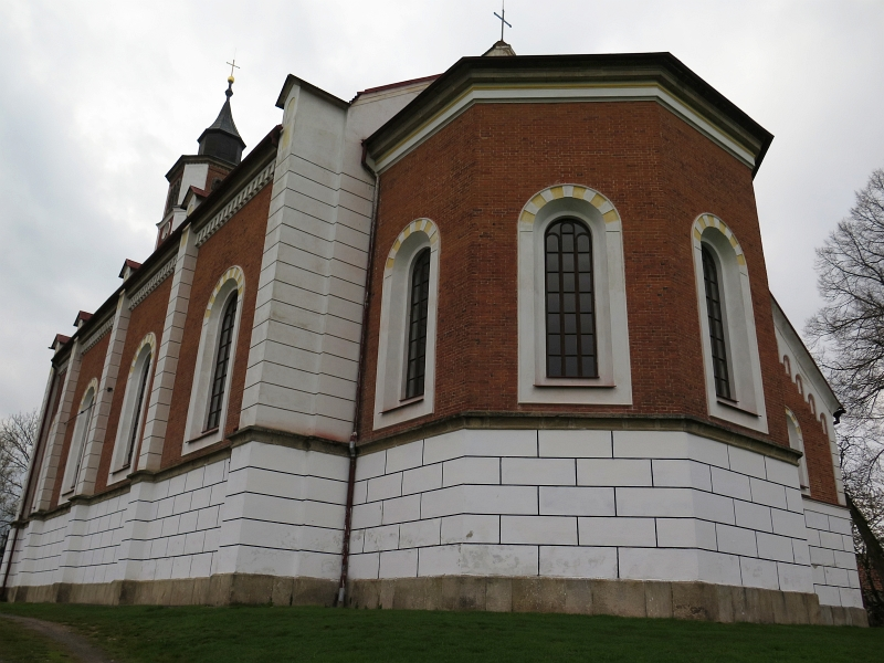 Kostel svatých Petra a Pavla, východní část obce, Borovnice (okres Benešov).